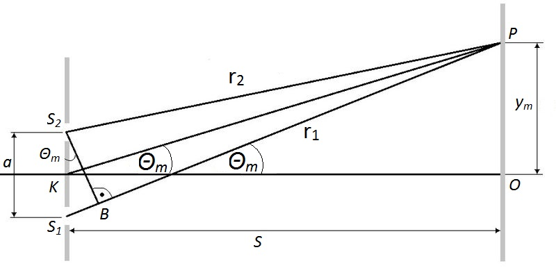 Kahe pilu eksperiment ehk Youngi katse.